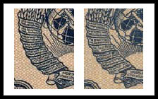 Фрагменты гербов СССР с банкнот в 1 рубль 1947 и 1957 годов.